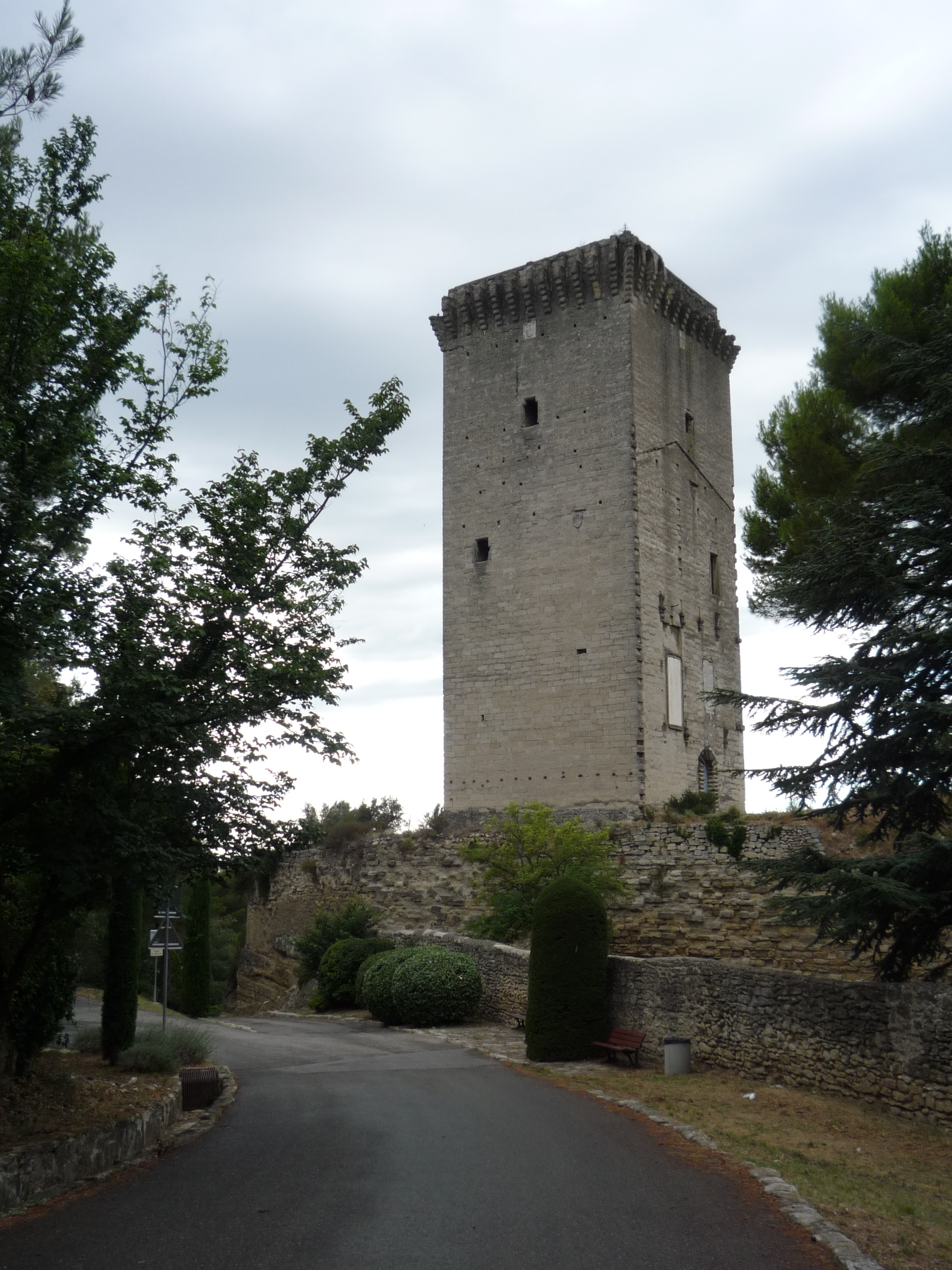 Tour du Cardinal Grimaldi à Barbentane